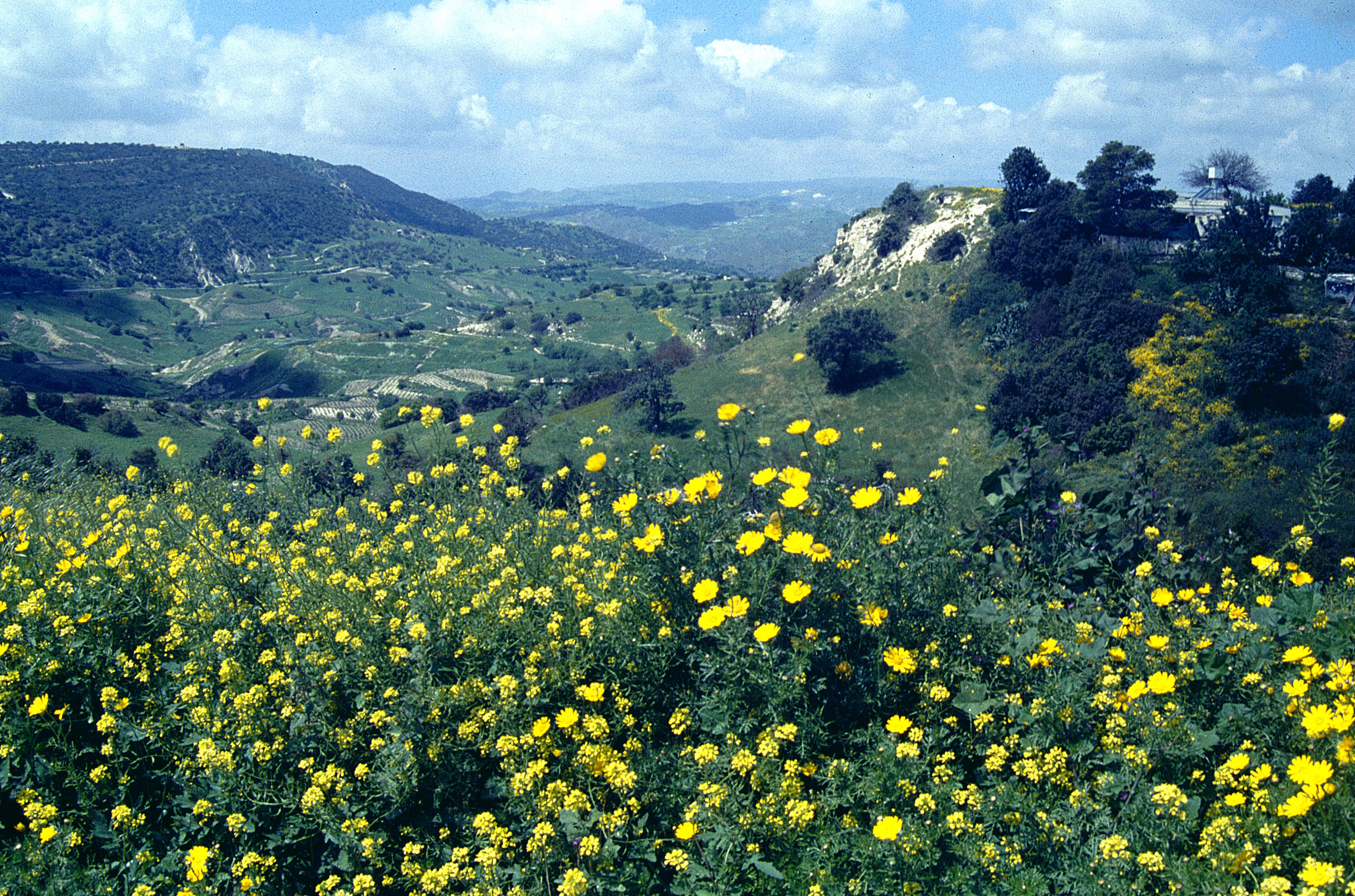 Pano Archimandrita